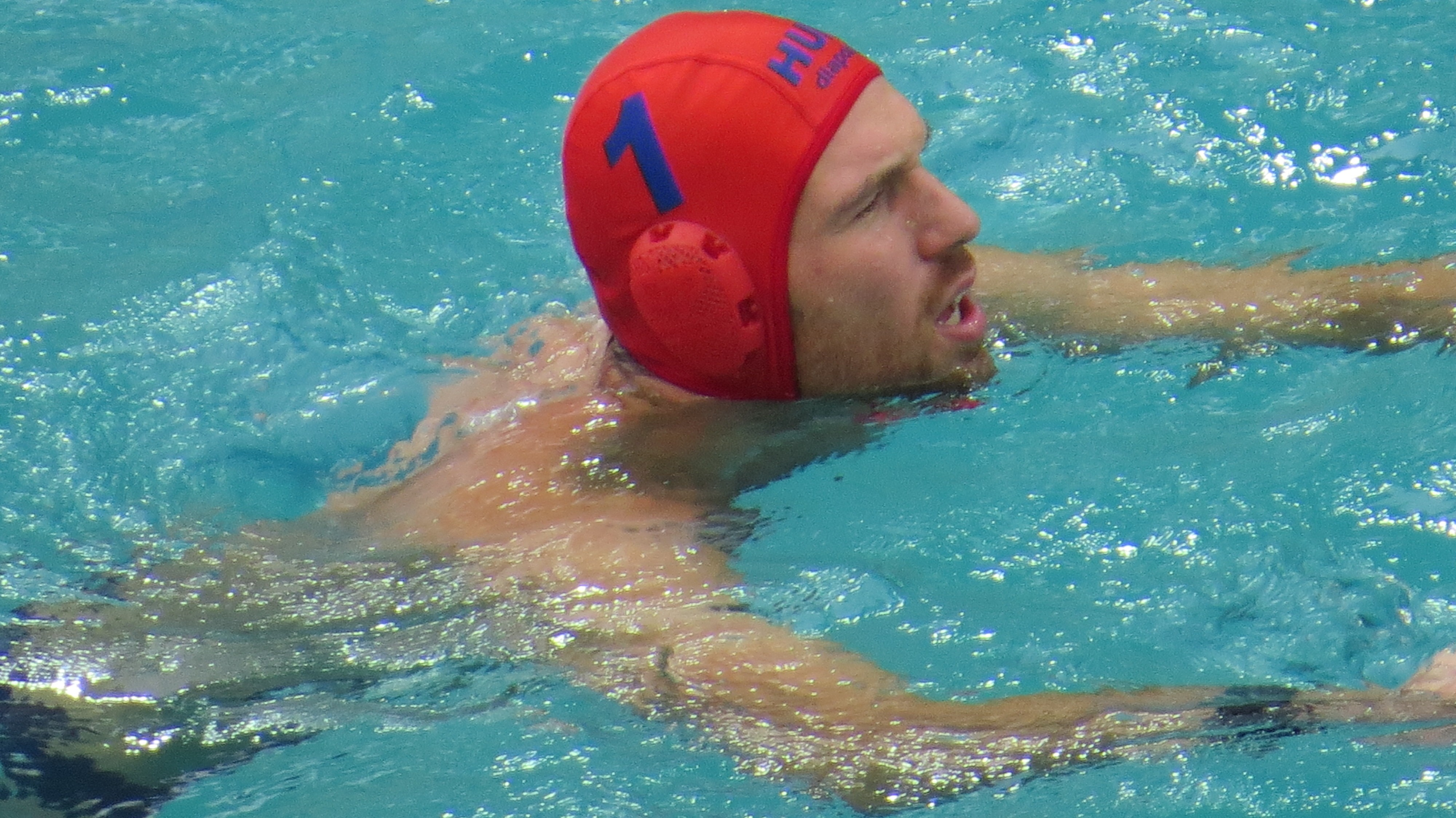 Rio 2016. Polo aquatico. sx50 91